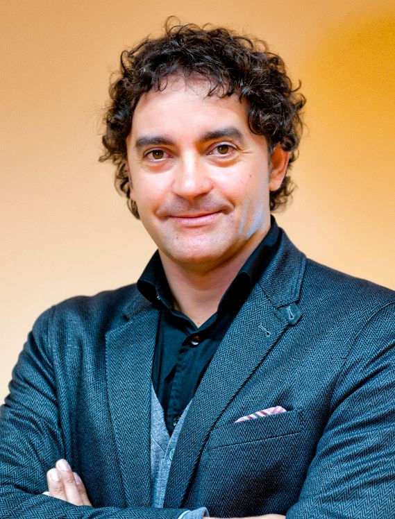 Francesc Colomer en 2012